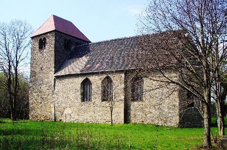 Hospitalkirche Gottesgnaden bei Calbe (Saale) in Sachsen-Anhalt